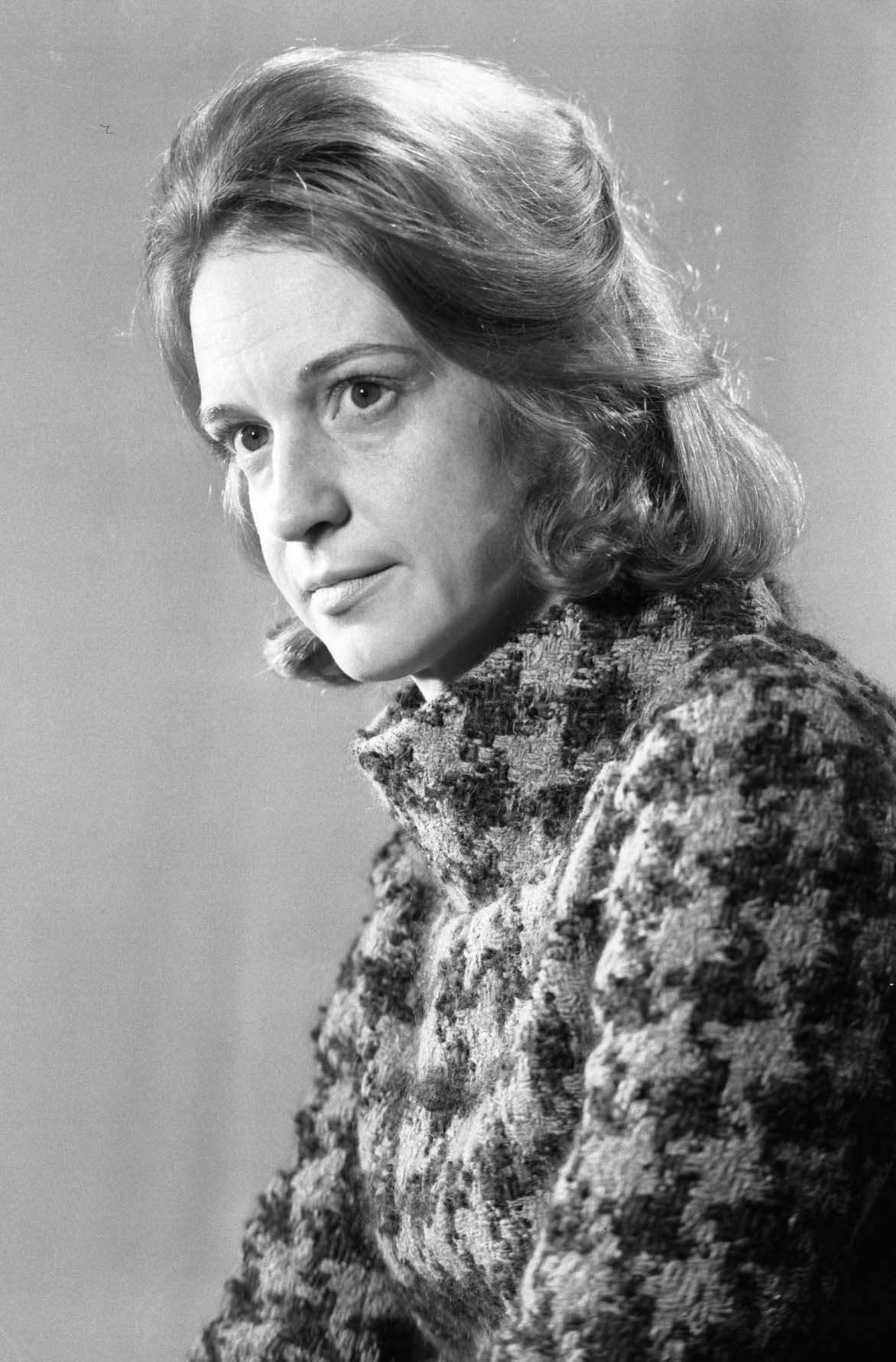 Portrait photographique d’Andrée Lajoie.